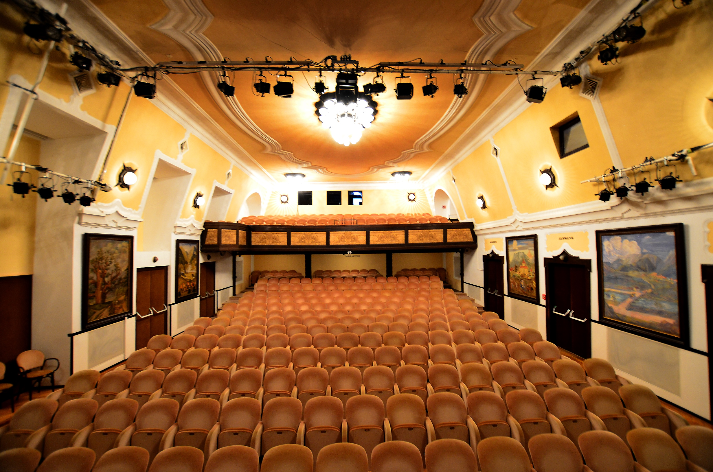 Innenansicht des Großen Saals der Festspiele Reichenau